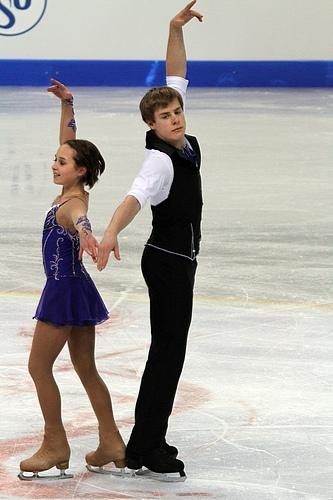 Камила Гайнетдинова и Иван Бич (Россия) на чемпионате мира по фигурному катанию среди юниоров 2012